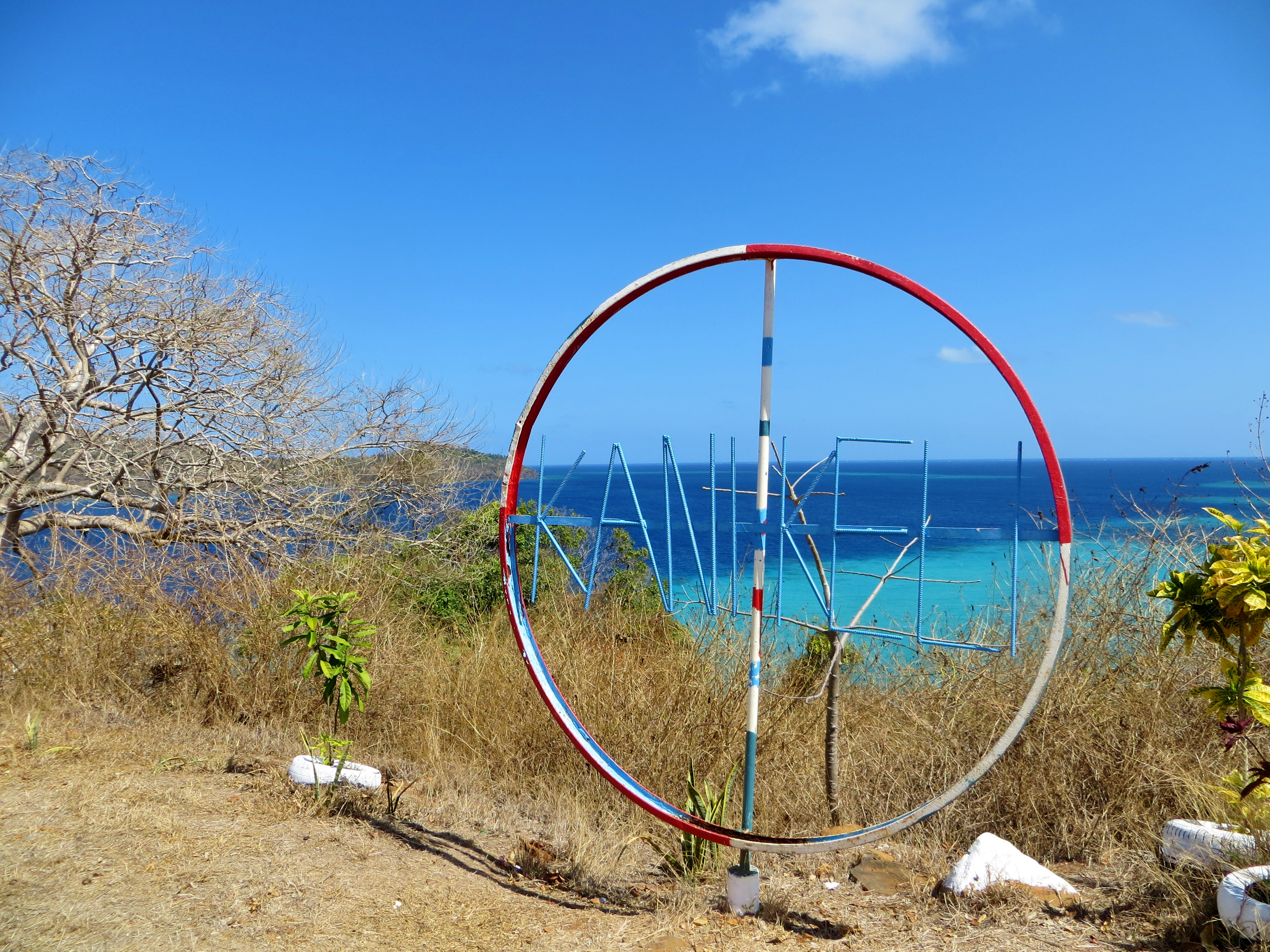 Signe annonçant l'entrée sur la commune de Kani-Kéli, dans le sud de Mayotte.